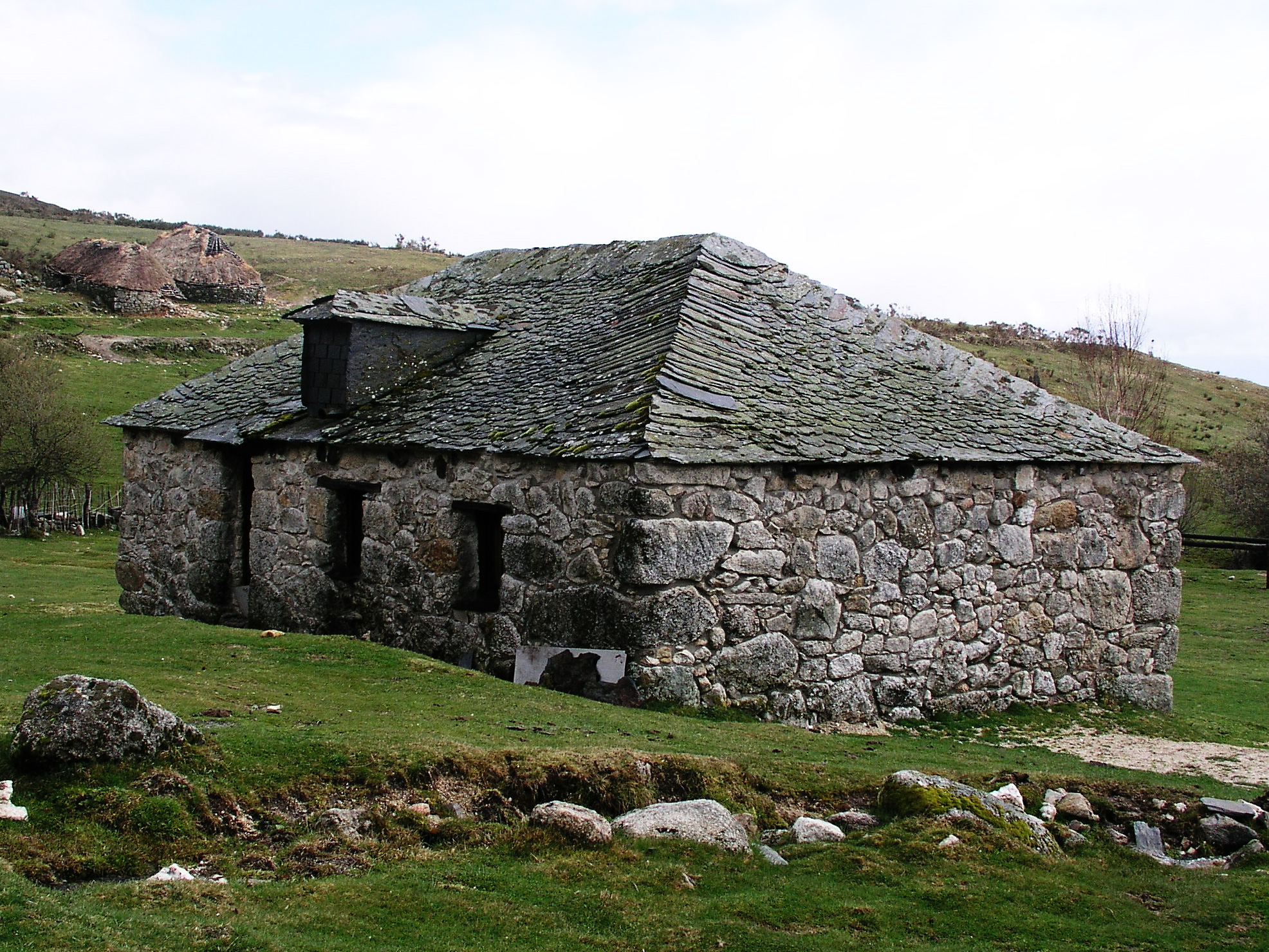 Palloza con techo de pizarra. Campo del Agua, Villafranca del Bierzo. El Bierzo, León, España.